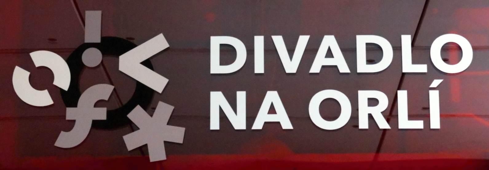 Divadlo na Orlí